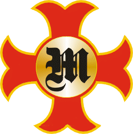 Das Logo des Monrealeser-Ritterordens